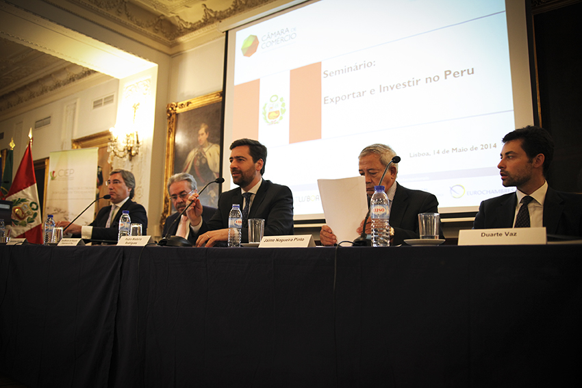 El Viceministro de Relaciones Exteriores del Perú, Embajador Fernando Rojas Samanez, efectuó una visita oficial de dos días a Lisboa, Portugal, con el objetivo de fortalecer los vínculos bilaterales y de cooperación mediante el diálogo político profundizado por los sucesivos encuentros de los Jefes de Estado de ambos países el 2012 y 2013. Continúa leyendo la nota en nuestra Web: bit.ly/1hO320L